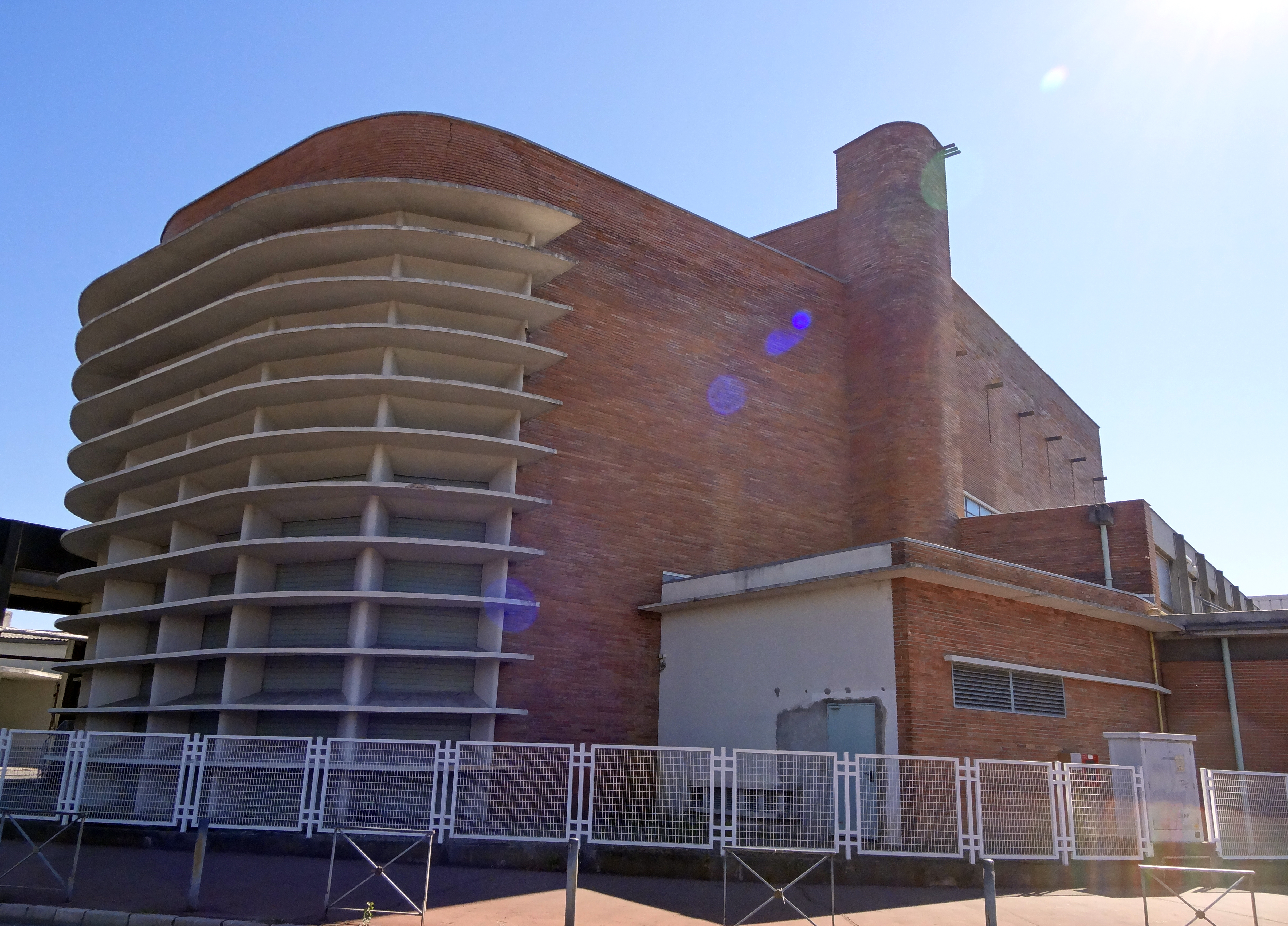 Soufflerie de Banlève à Toulouse, construite en 1937 et inscrite au patrimoine du XXè siècle en 1997. .